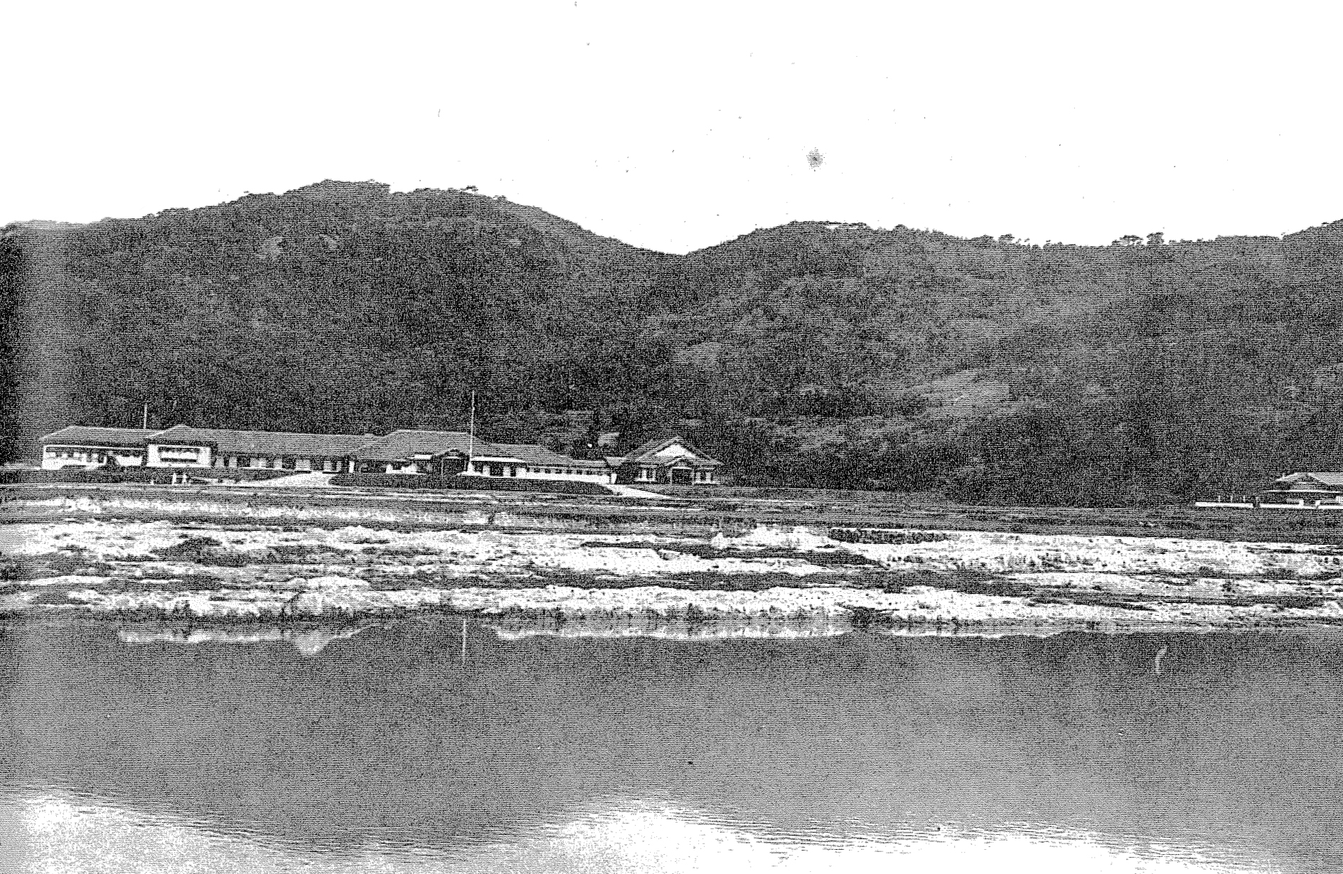 中文（台灣）: 圖中建築為國民精神研修所，後方為台灣神功神苑，前方為四海潭